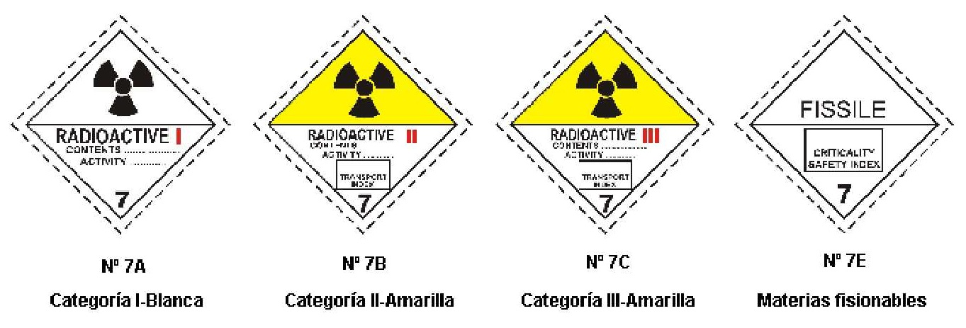 Eiquetas para bultos, sobreembalajes y contenedores radiactivos